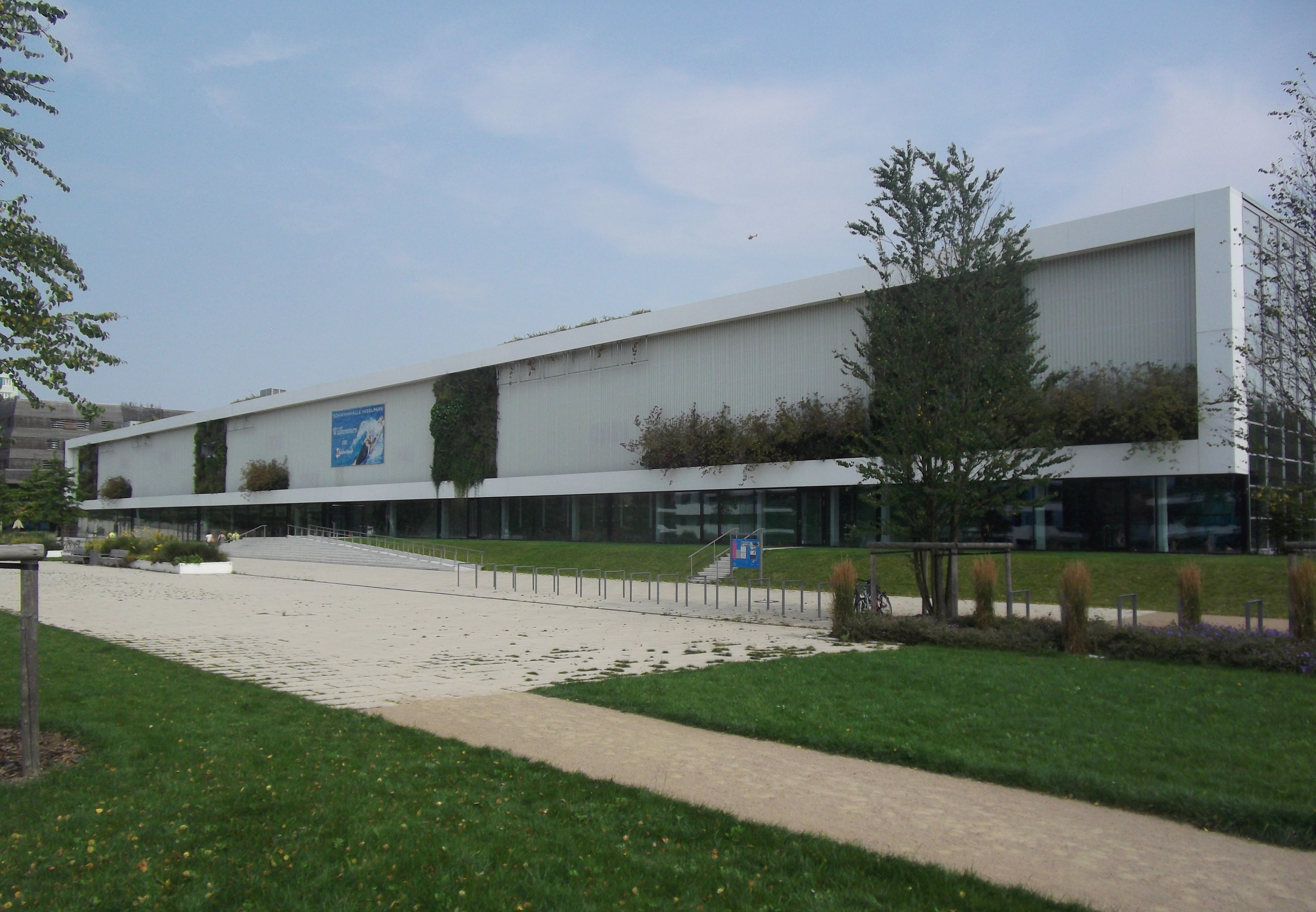 Inselparkhalle (erbaut 2013), Kurt-Emmerich-Platz 10-12, Wilhelmsburg, Hamburg im August 2015.